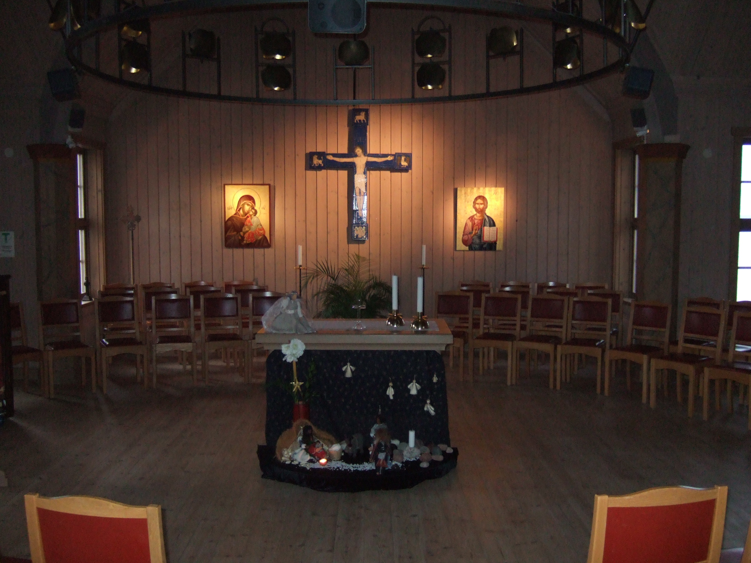 Enhetens kapell, Stiftsgården i Rättvik Sverige i Juletid 2006